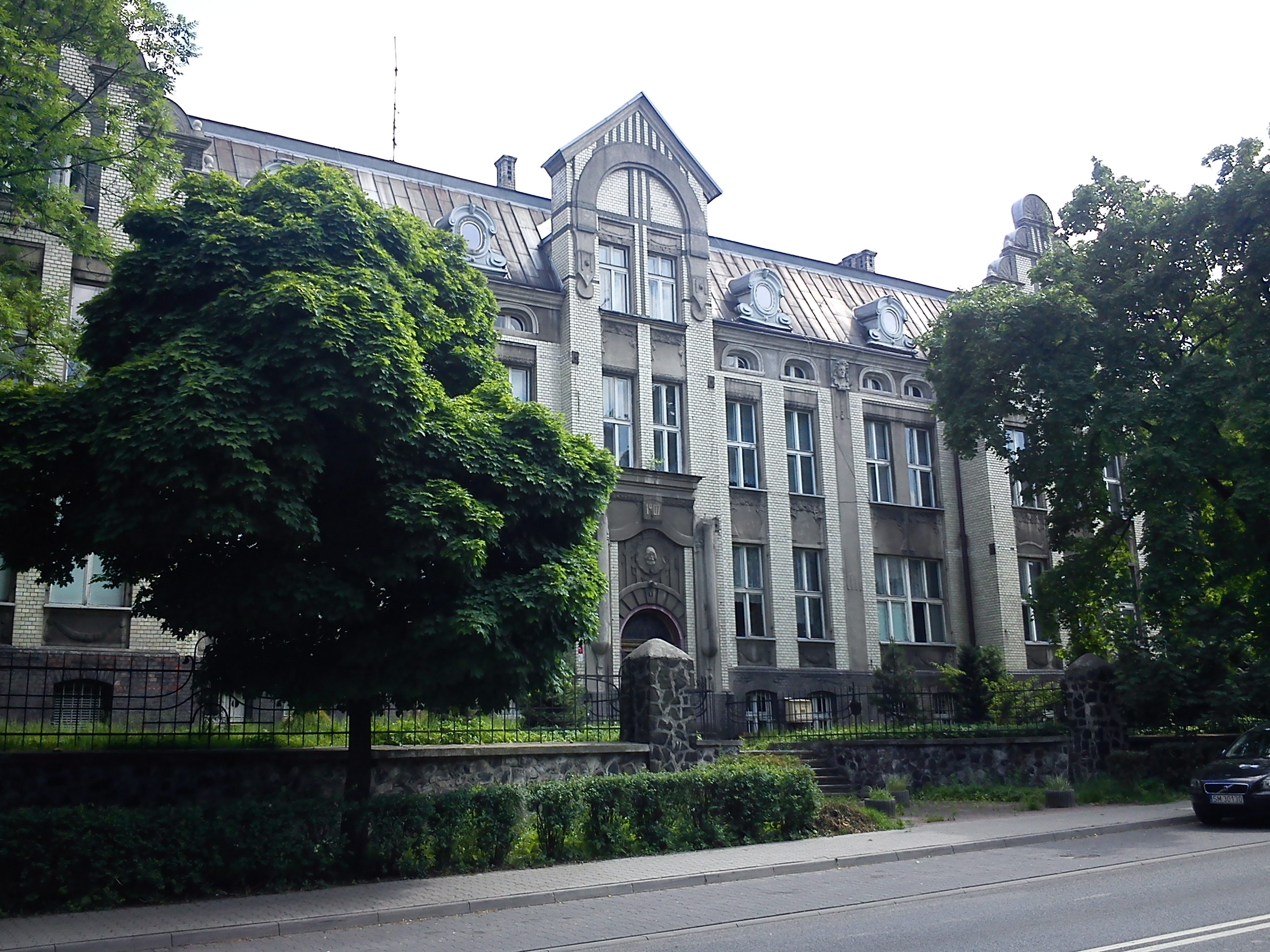 Mysłowice-Szpital Miejski nr1.Wybudowany w 1907 r.